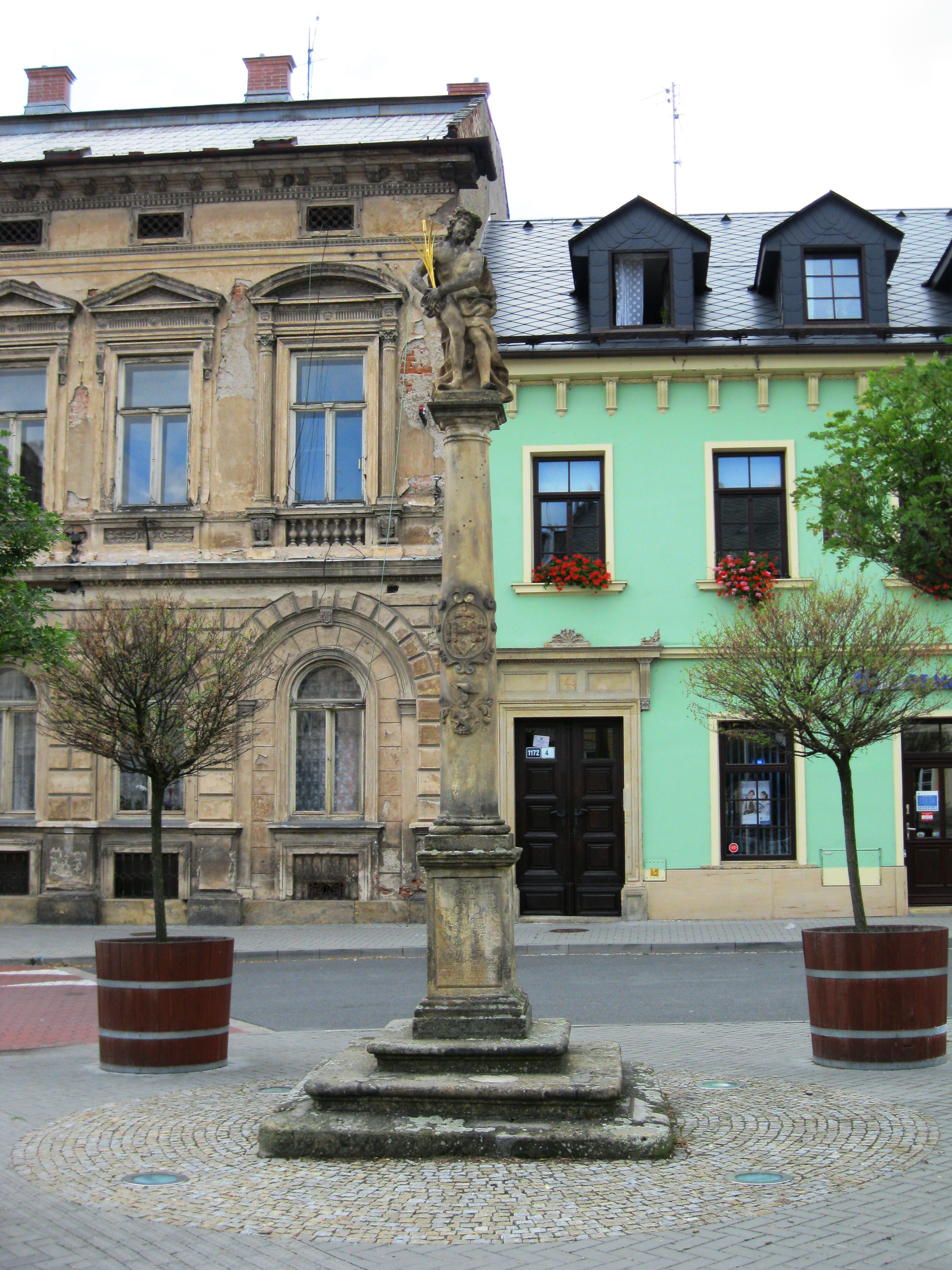 Sloup se sochou Ecce Homo (Šternberk), Bezručova, proti čp. 1172, Šternberk